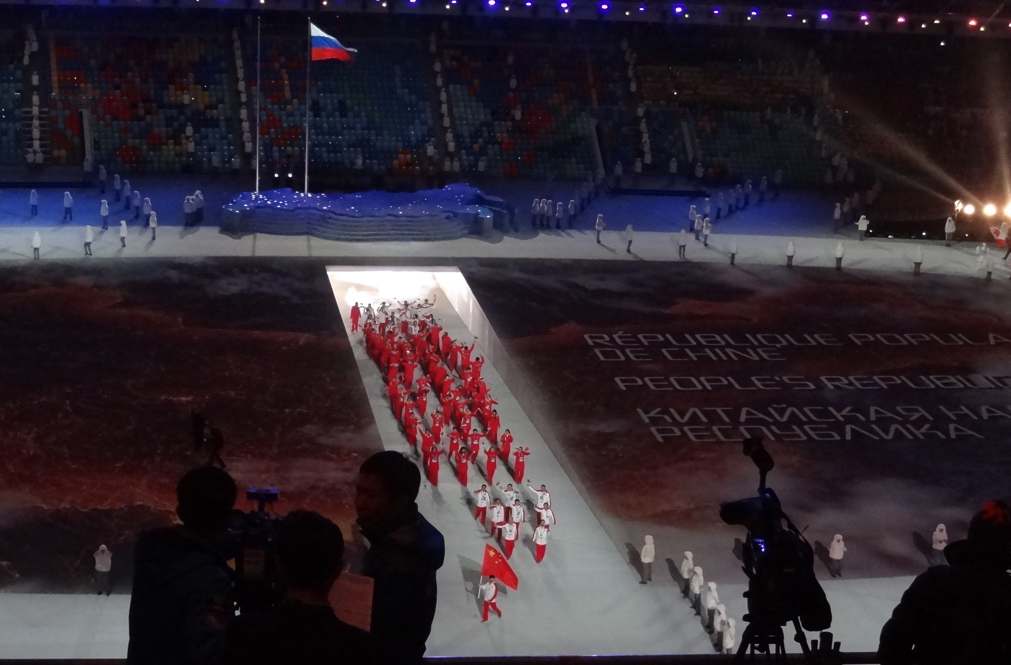 Церемония открытия Олимпийских игр в Сочи, 7 февраля 2014 года. Сборная Китайской Народной Республики.